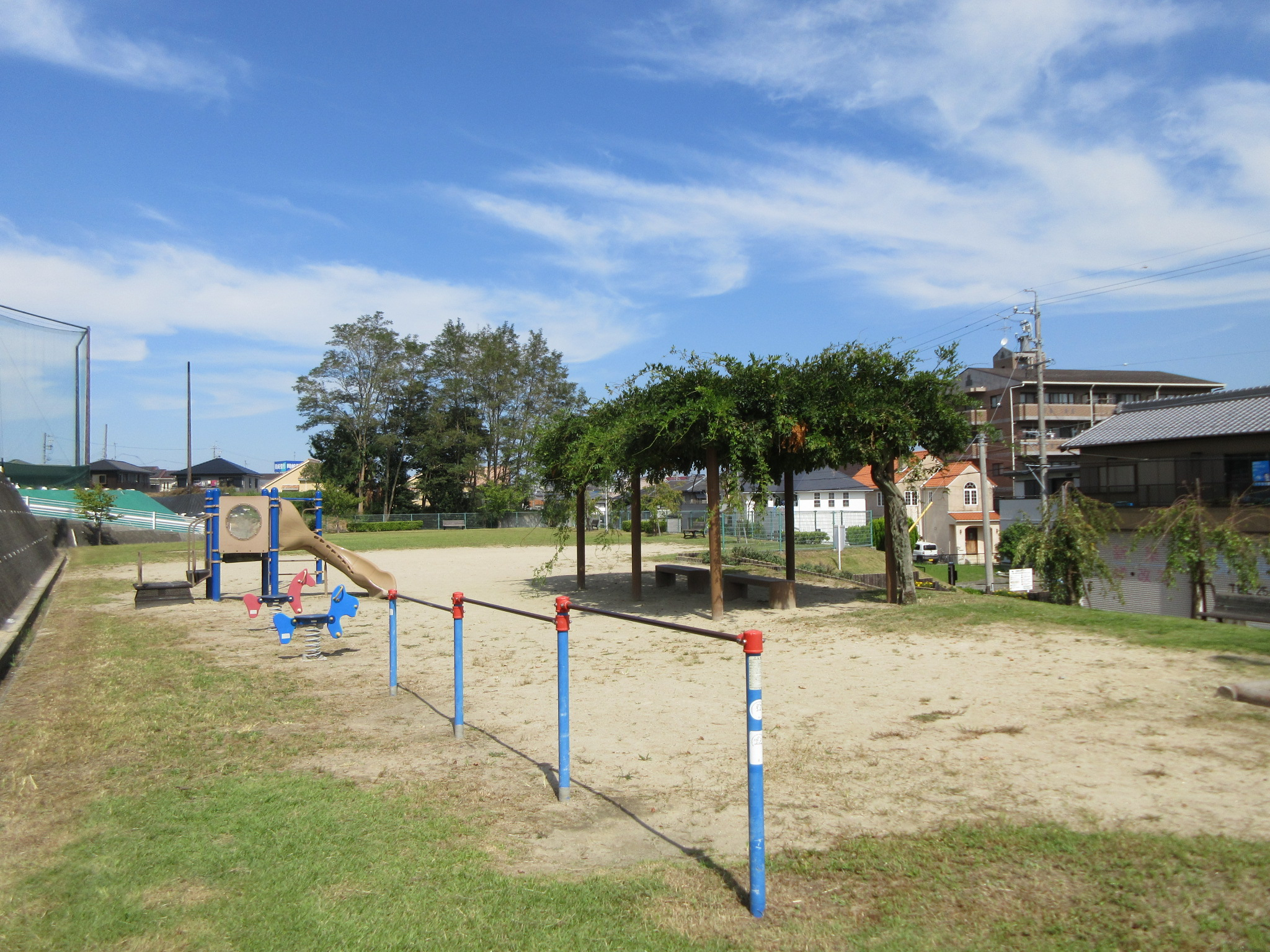 四反田公園（岡崎市真伝）